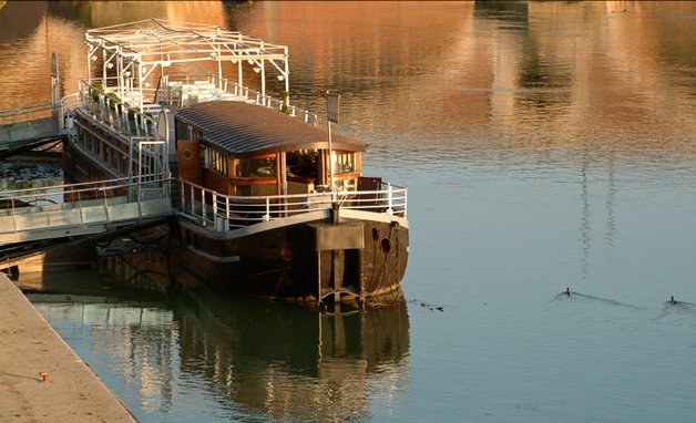 Toulouse, une péniche restaurant, quai de la Daurade